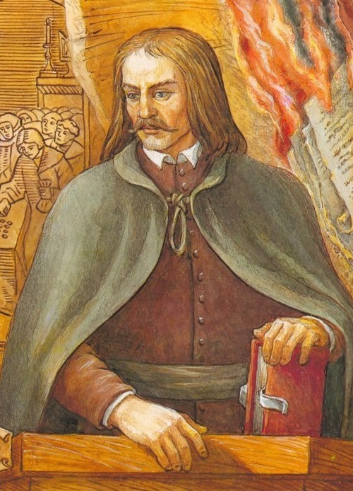 Kazimierz Łyszczyński (1634-1689) – polski filozof skazany na śmierć za ateizm, autor traktatu De non existentia Dei („O nieistnieniu Boga”).